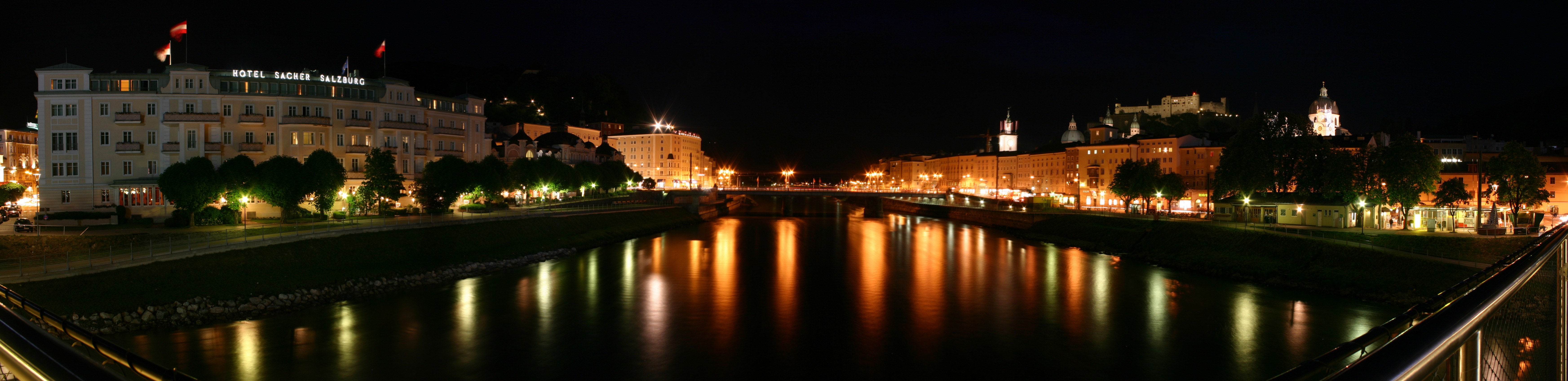 Salzburg Stadt Österreich mit Blick vom Makartsteg auf die Salzach Photograph by Raoul Grabner Camera: Canon EOS 300D Date: 13.05.2005 20:43 License: Public Domain EXIF-TAGS